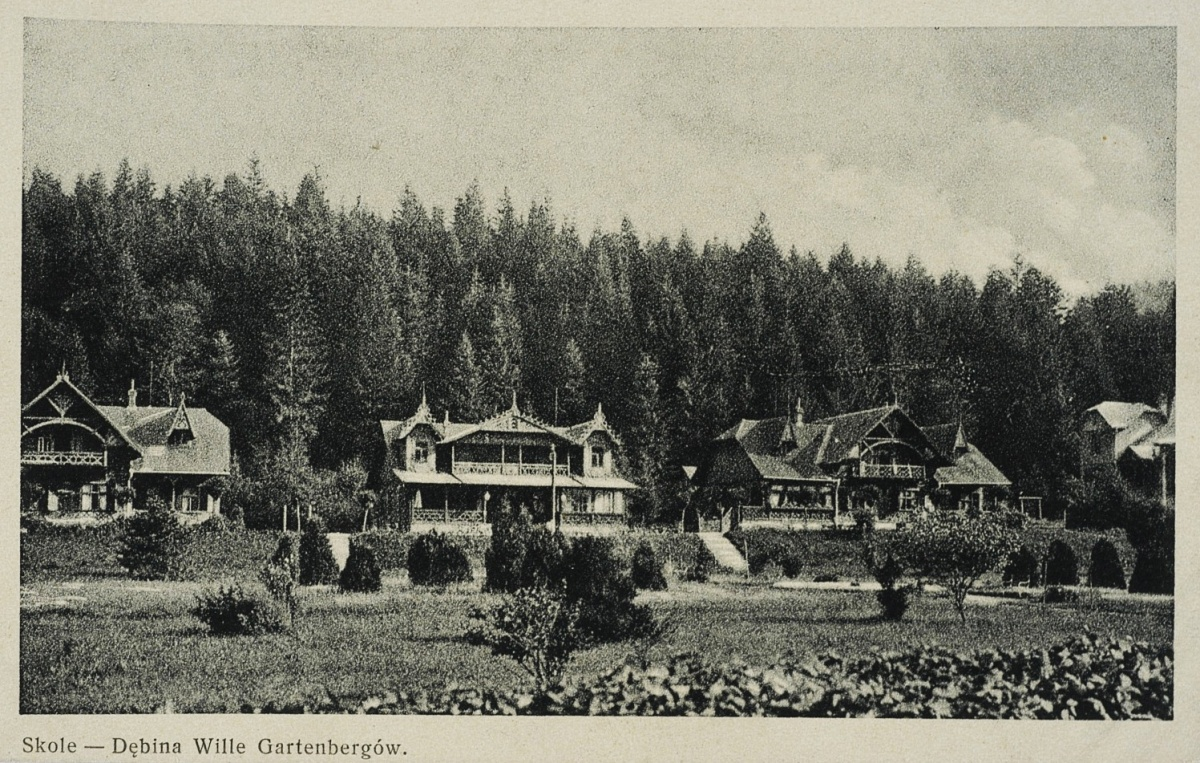 Виллы в с. Дубина возле Сколе. Архивное фото.